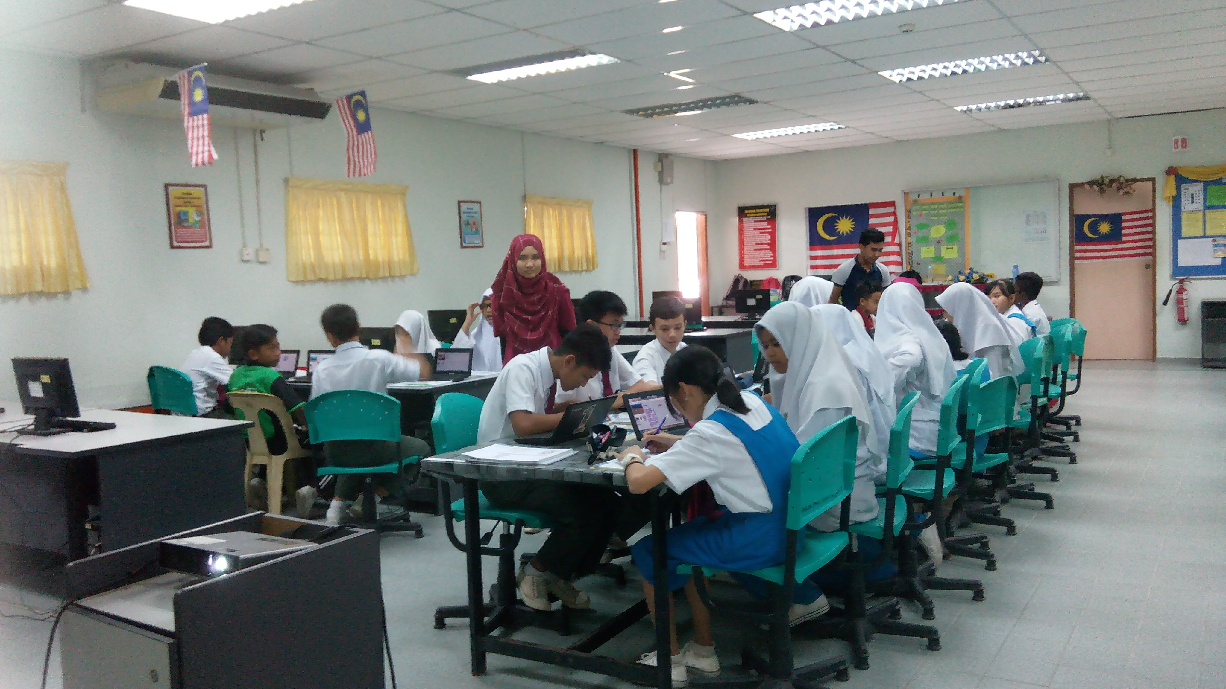 Pelajar dapat menggunakan Makmal Komputer untuk sesi PdPc dengan begitu kondusif.